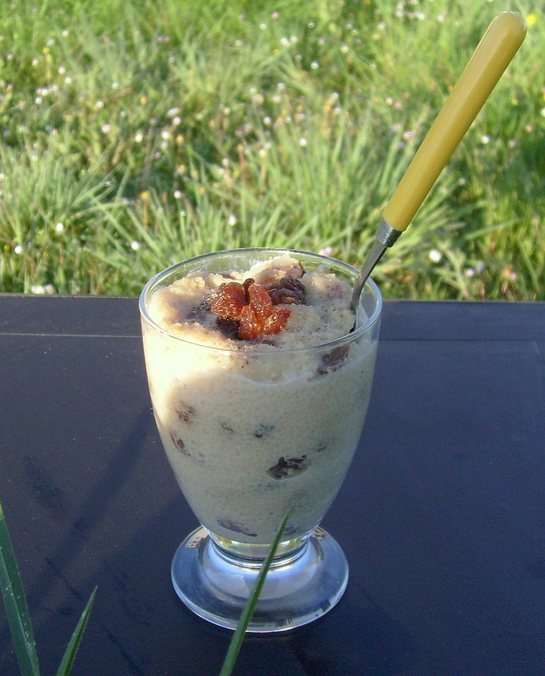 Apothermum, dessert à base de semoule, de lait et de fruits secs d'origine antique.